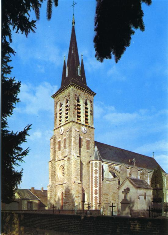 Eglise de notre dame de la sainte espérance de Mesnil Saint Loup